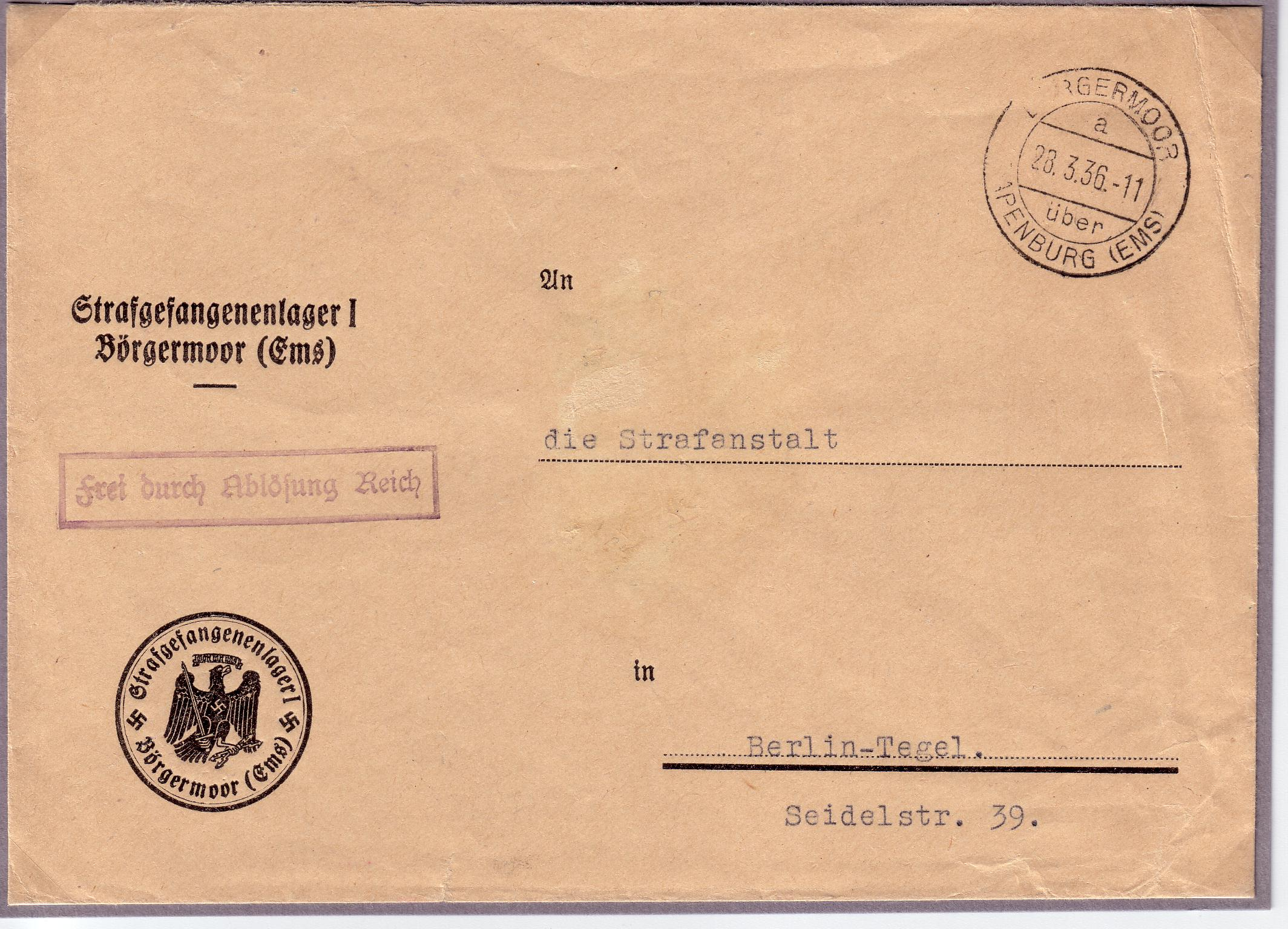 Dienstbrief Frei durch Ablösung Reich aus dem Strafgefangenenlager I Börgermoor (Ems)von 1936 Dienstsiegel: "Strafgefangenenlager I Börgermoor (Ems)" Poststempel: "Börgermoor (über Papenburg (Ems)), 28.3.1936.